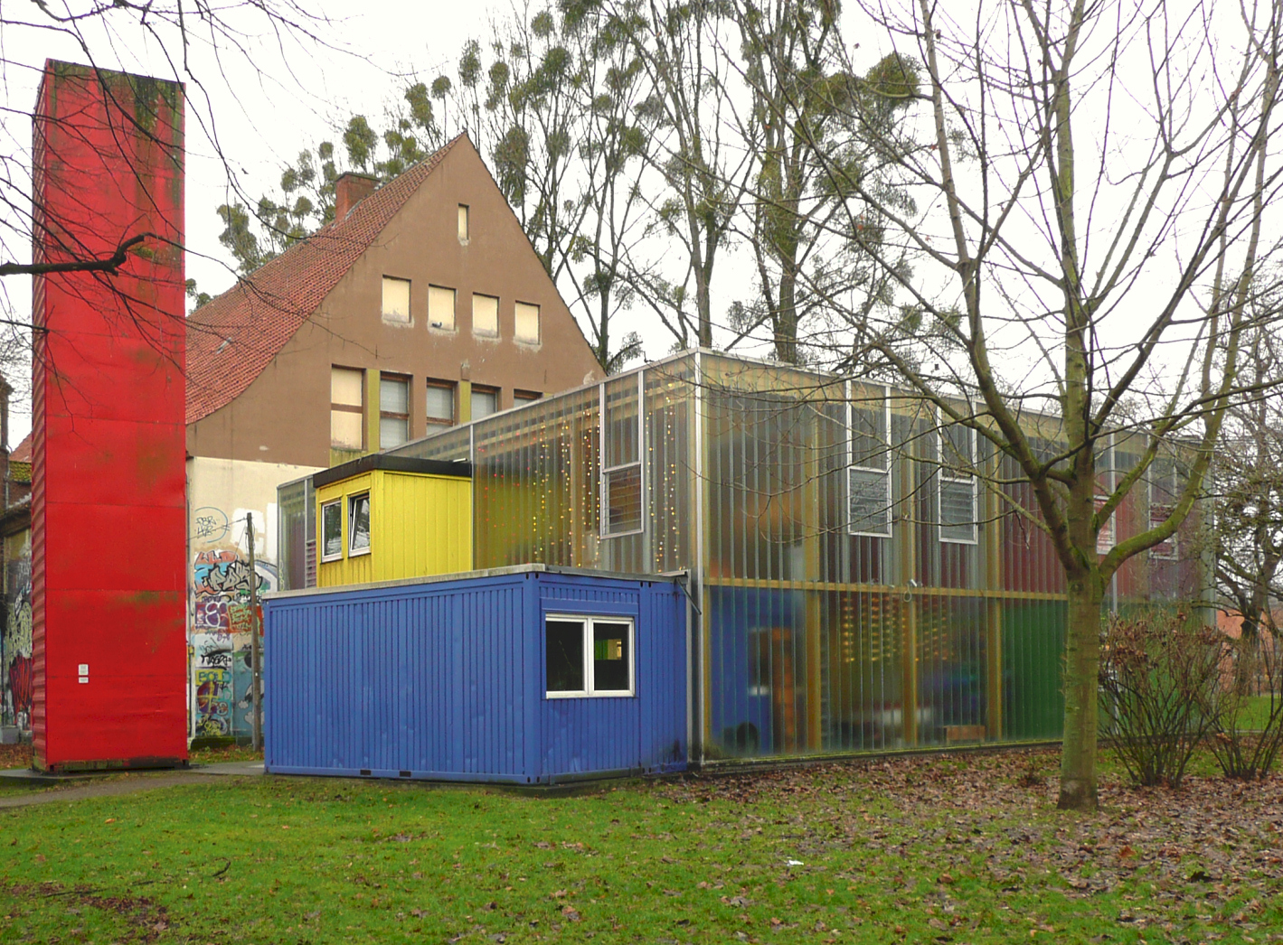 Bed by night Hannover auf dem Welfenplatz, Architekt ist Hanfried Slawik